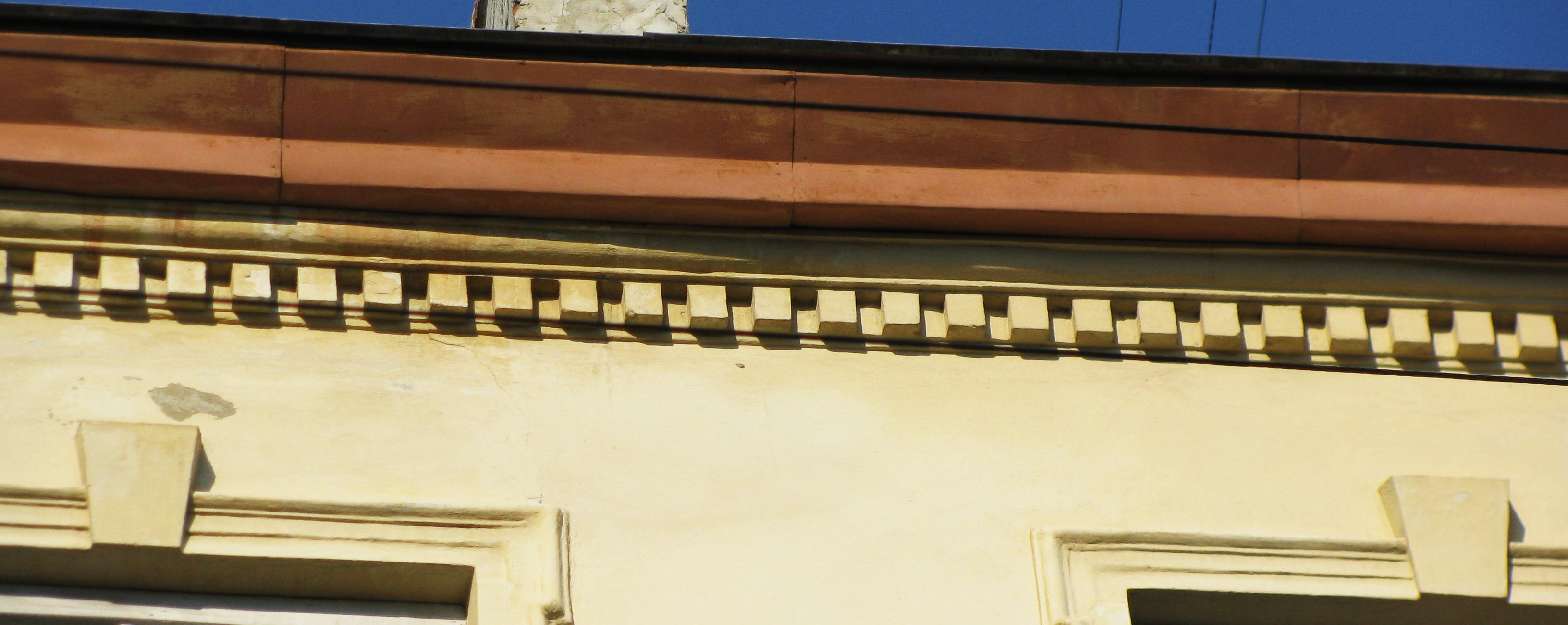 Вулиця Галицька, 16. (1791)